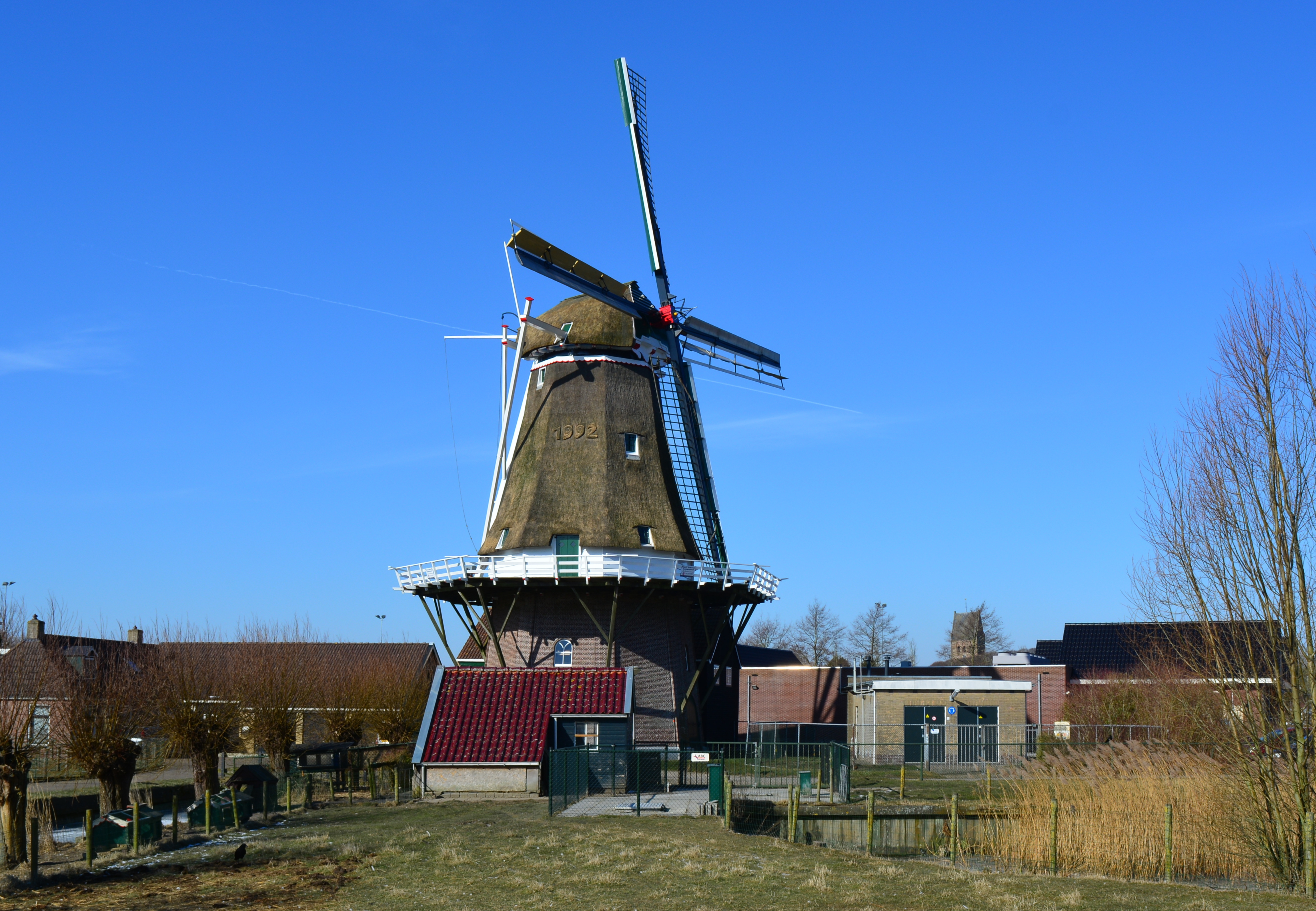 Nôtmûne "De Hoop", Stiens